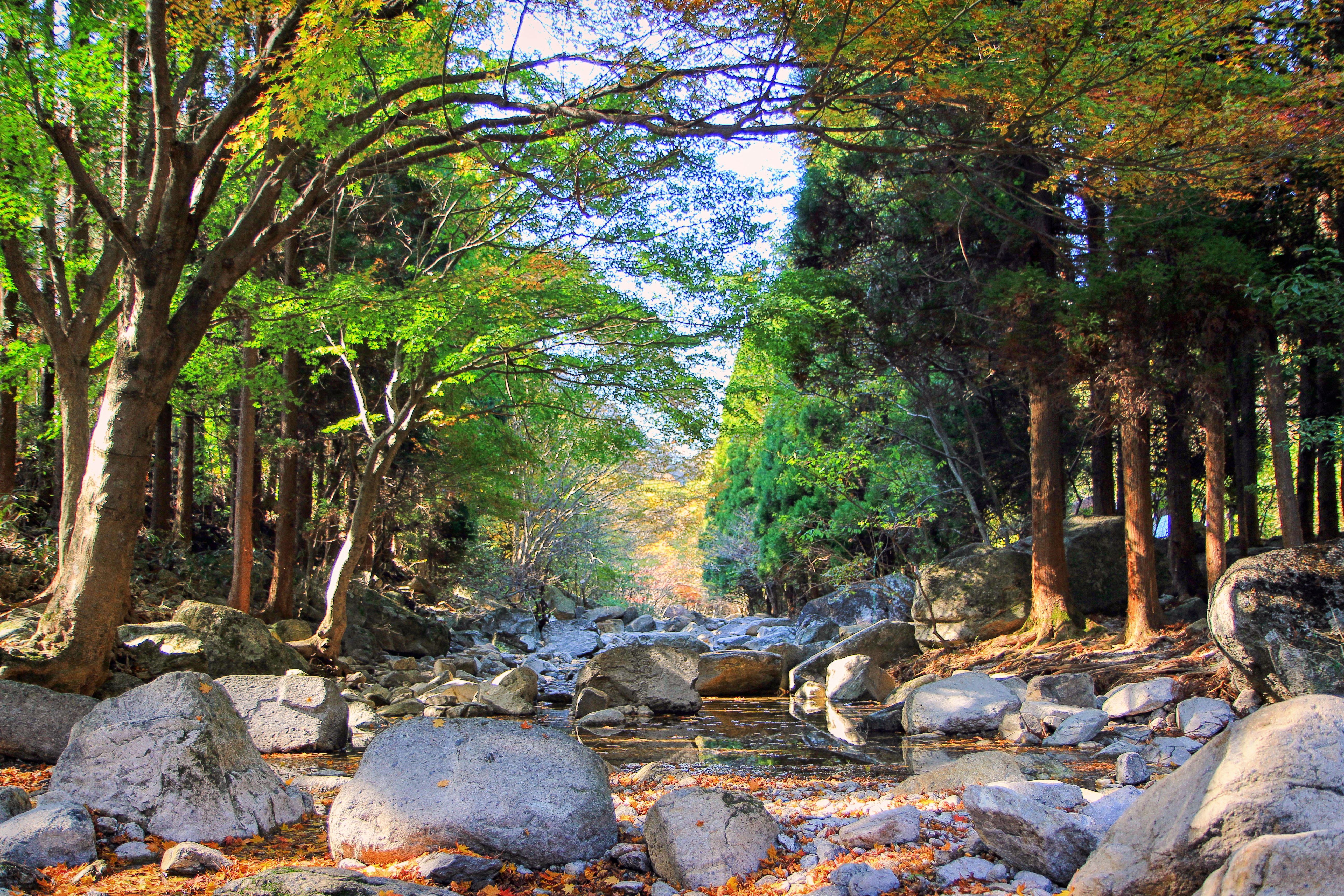 한국어 (조선): 아름다운 내장산의 남창계곡